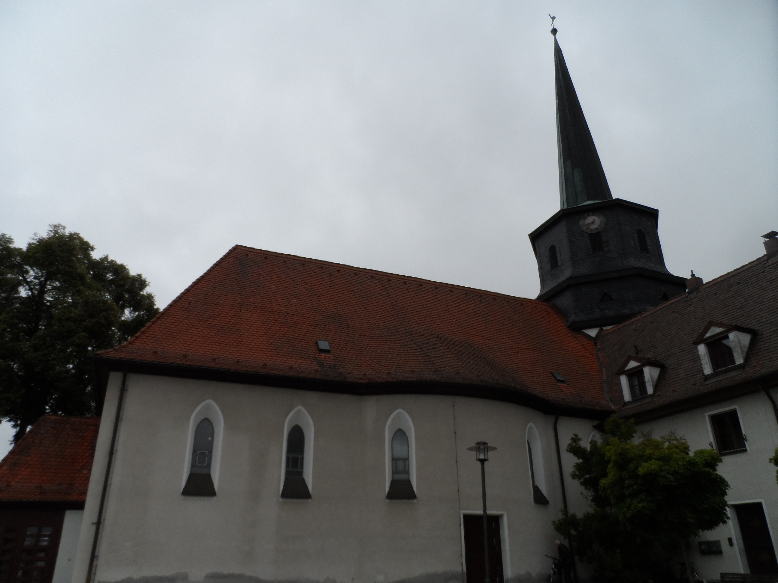 Pfarrkirche St. Josef in Niederndorf